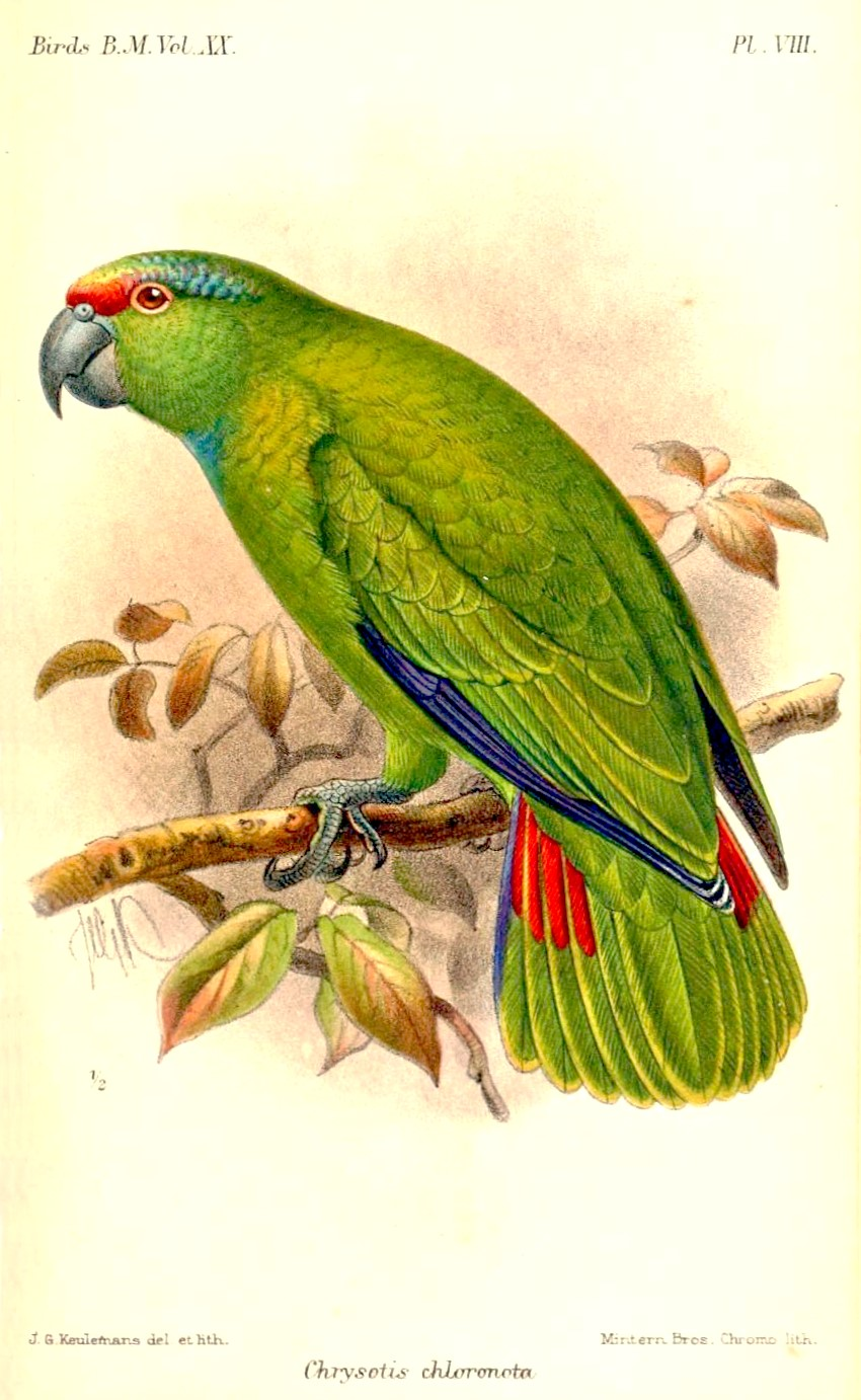 Chrysotis chloronota = Amazona festiva, Festive Amazon